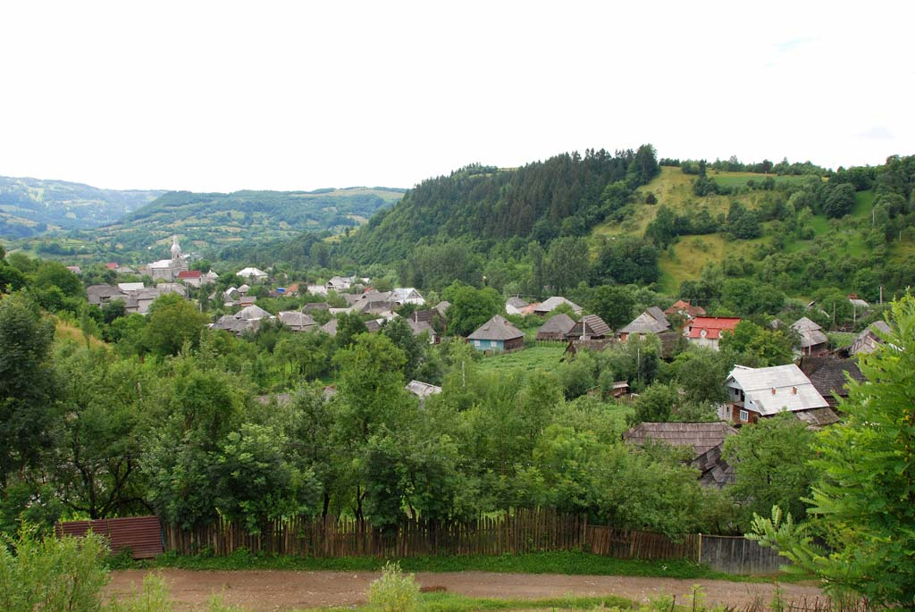 Săcel - Westansicht